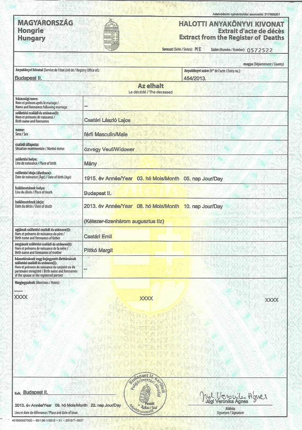 Csatáry László halotti anyakönyvi kivonat